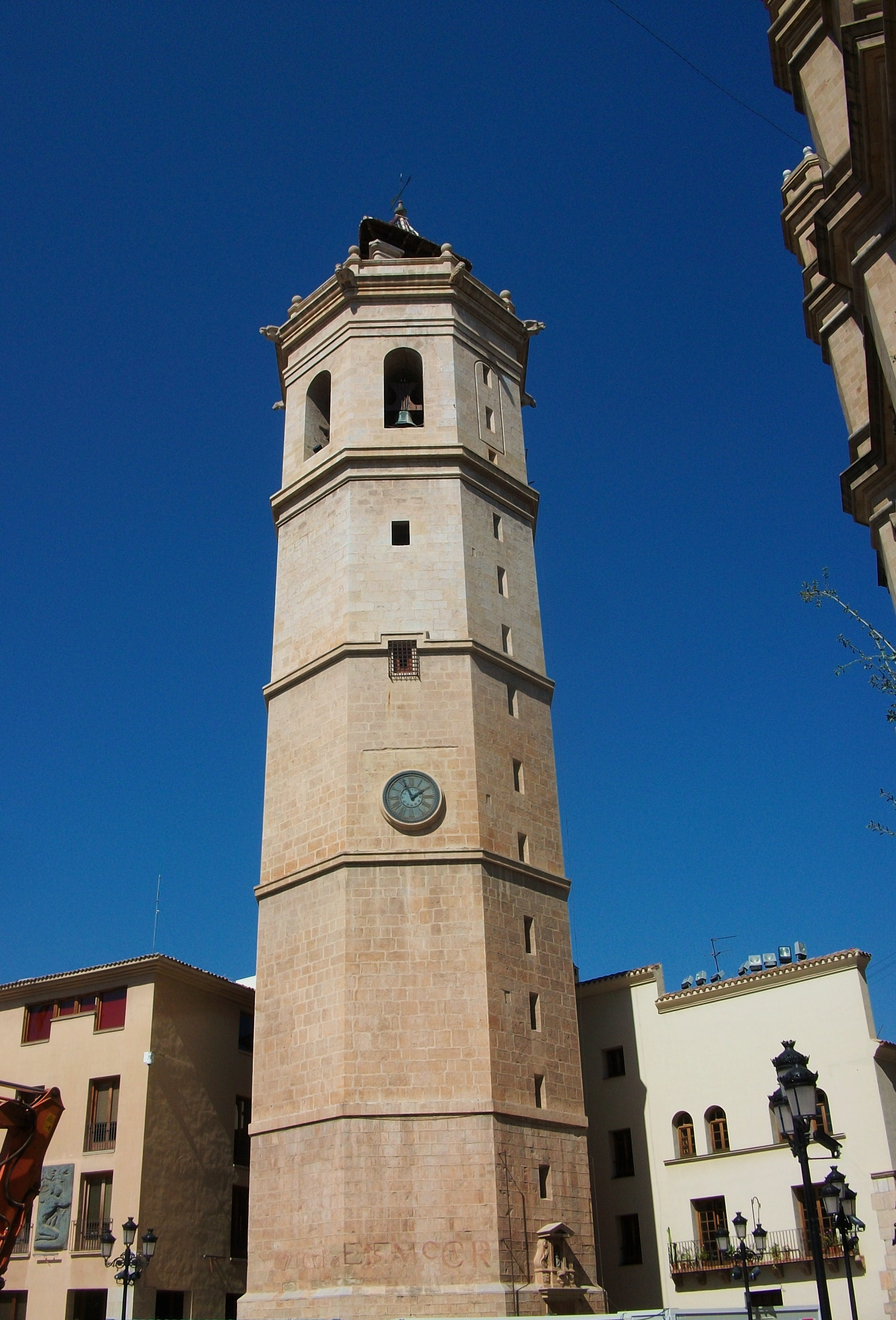 Torre del Fadrí de Castelló de la Plana.